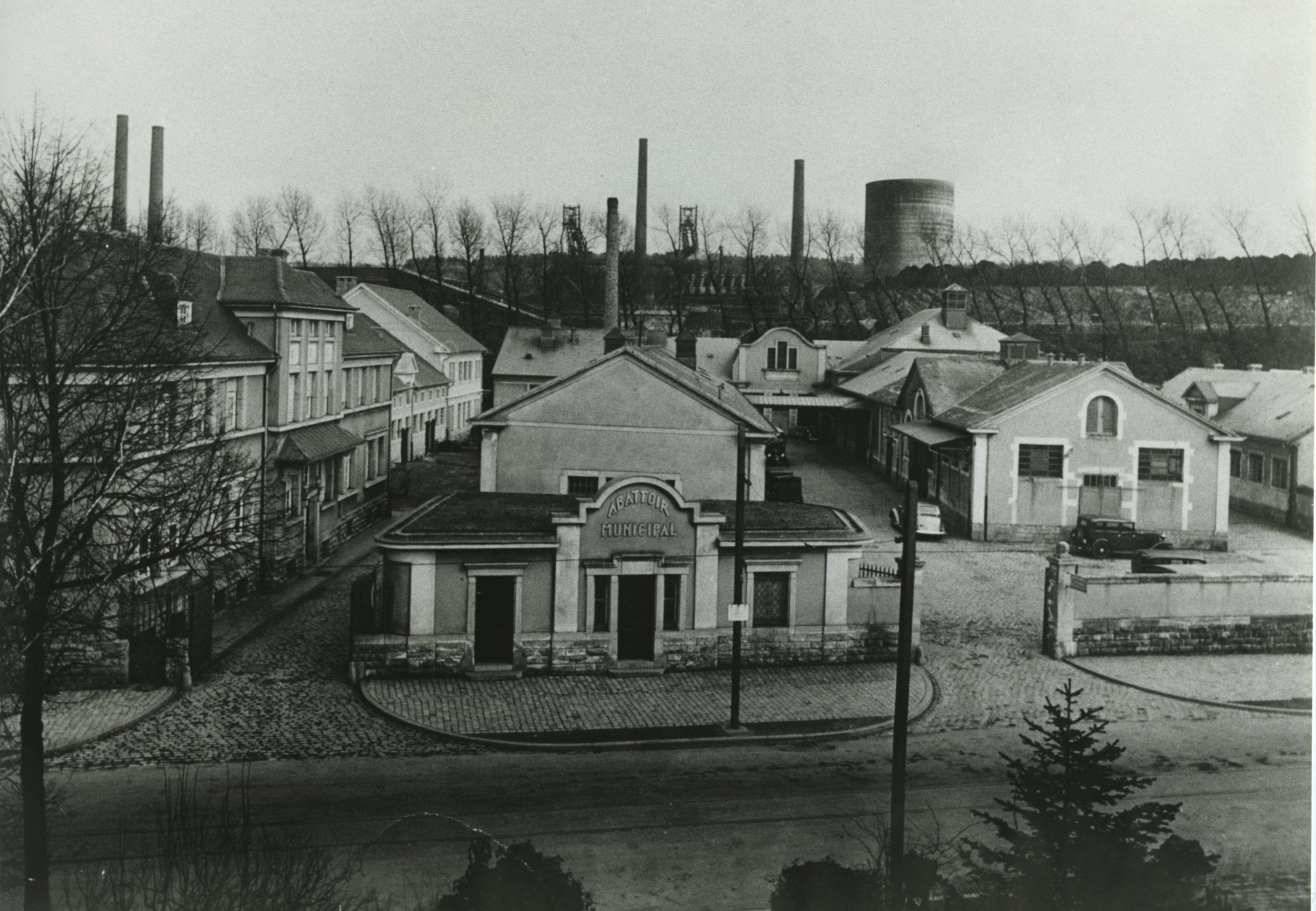 L'ancien abattoir d'Esch-sur-Alzette.